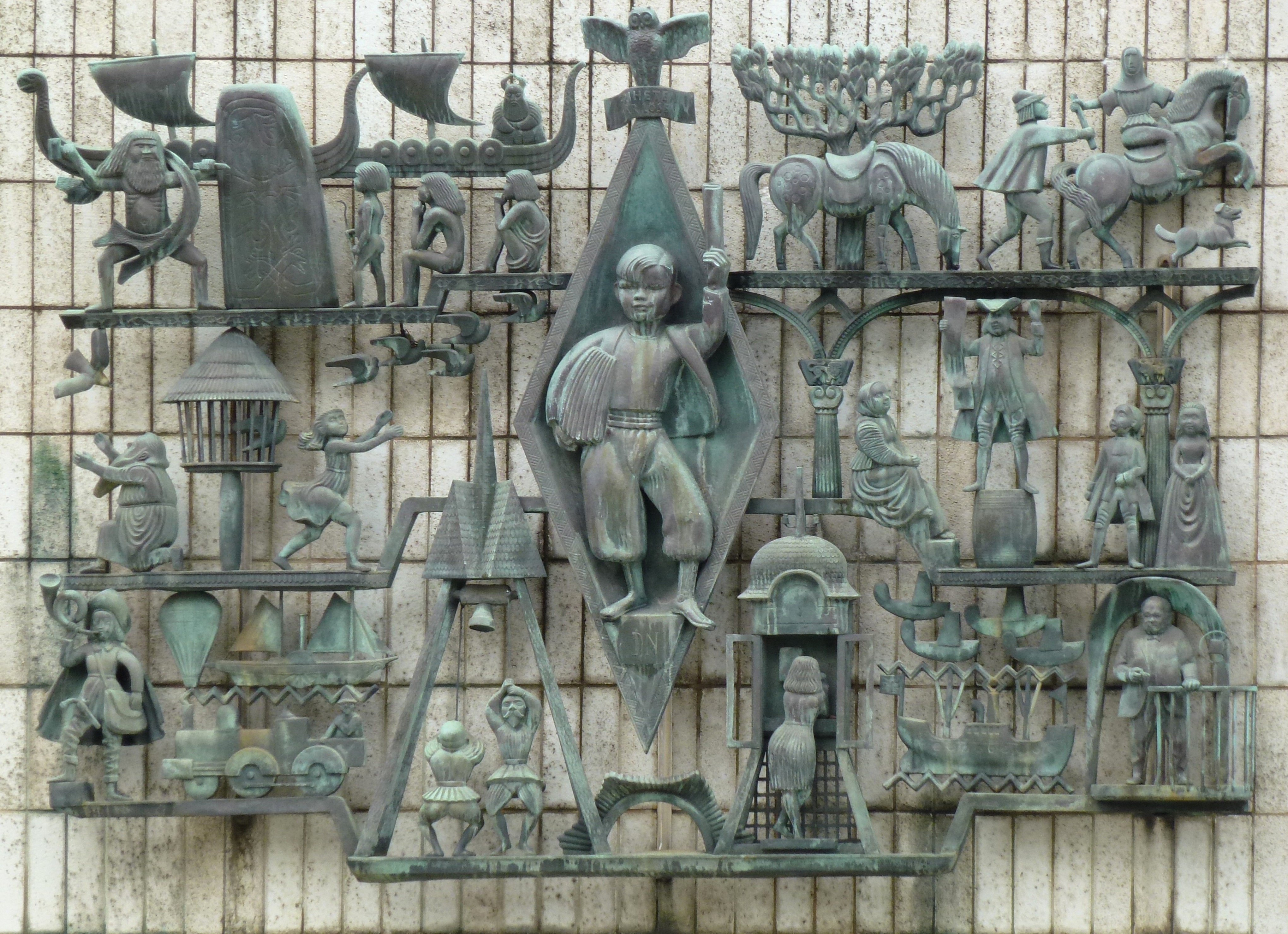 Friheten vår lösen, skulptur av Stig Blomberg utanför Dagens Nyheter